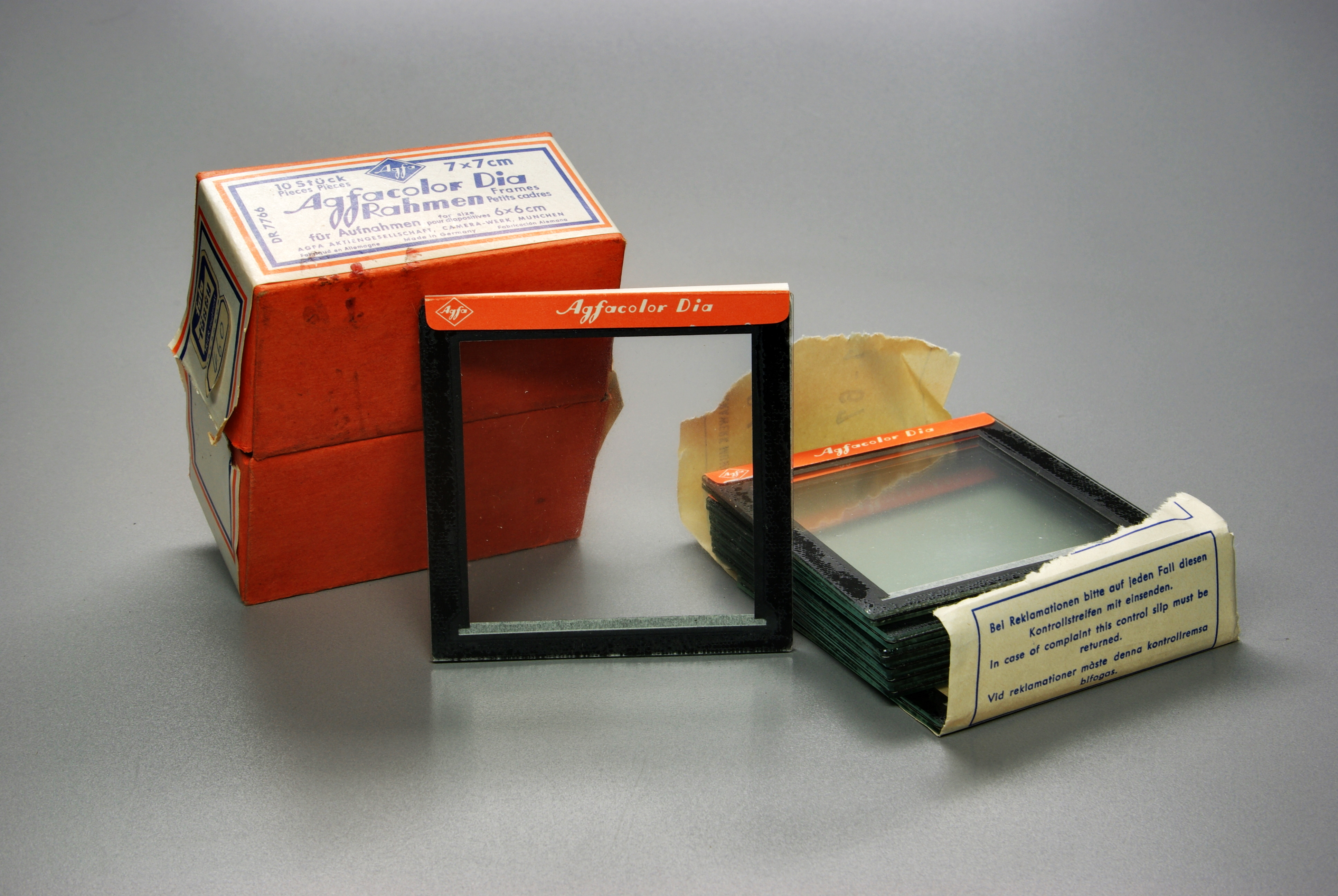 Diarahmen Agfacolor 6x6 cm